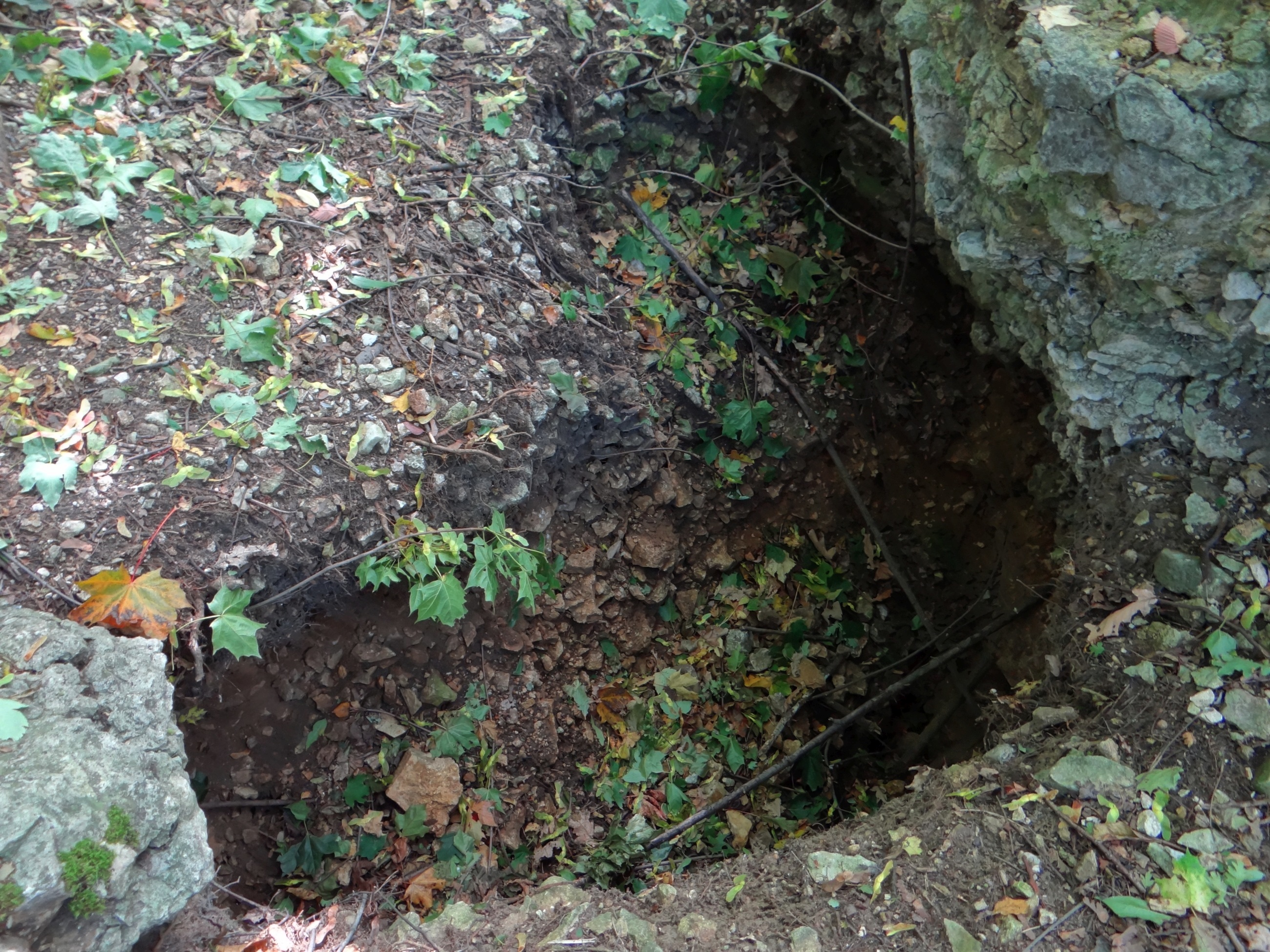 Jaskinia z Kulkami